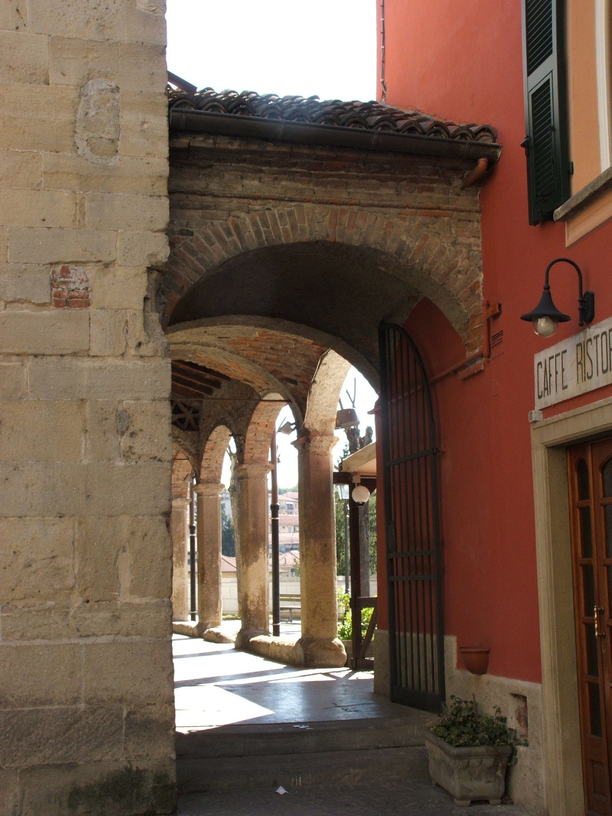 Gavi, Piemonte, Italia